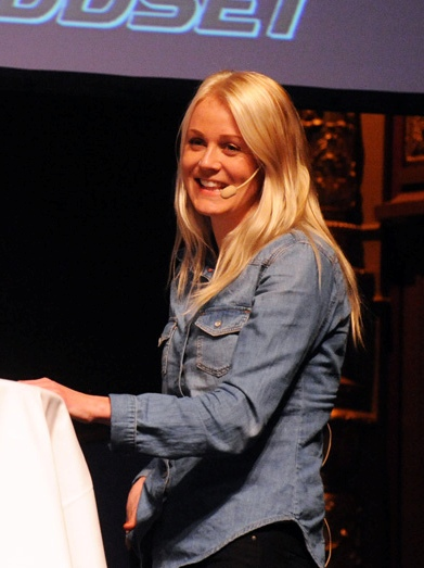 Elisabet Gunnarsdottir och Josefine Öqvist